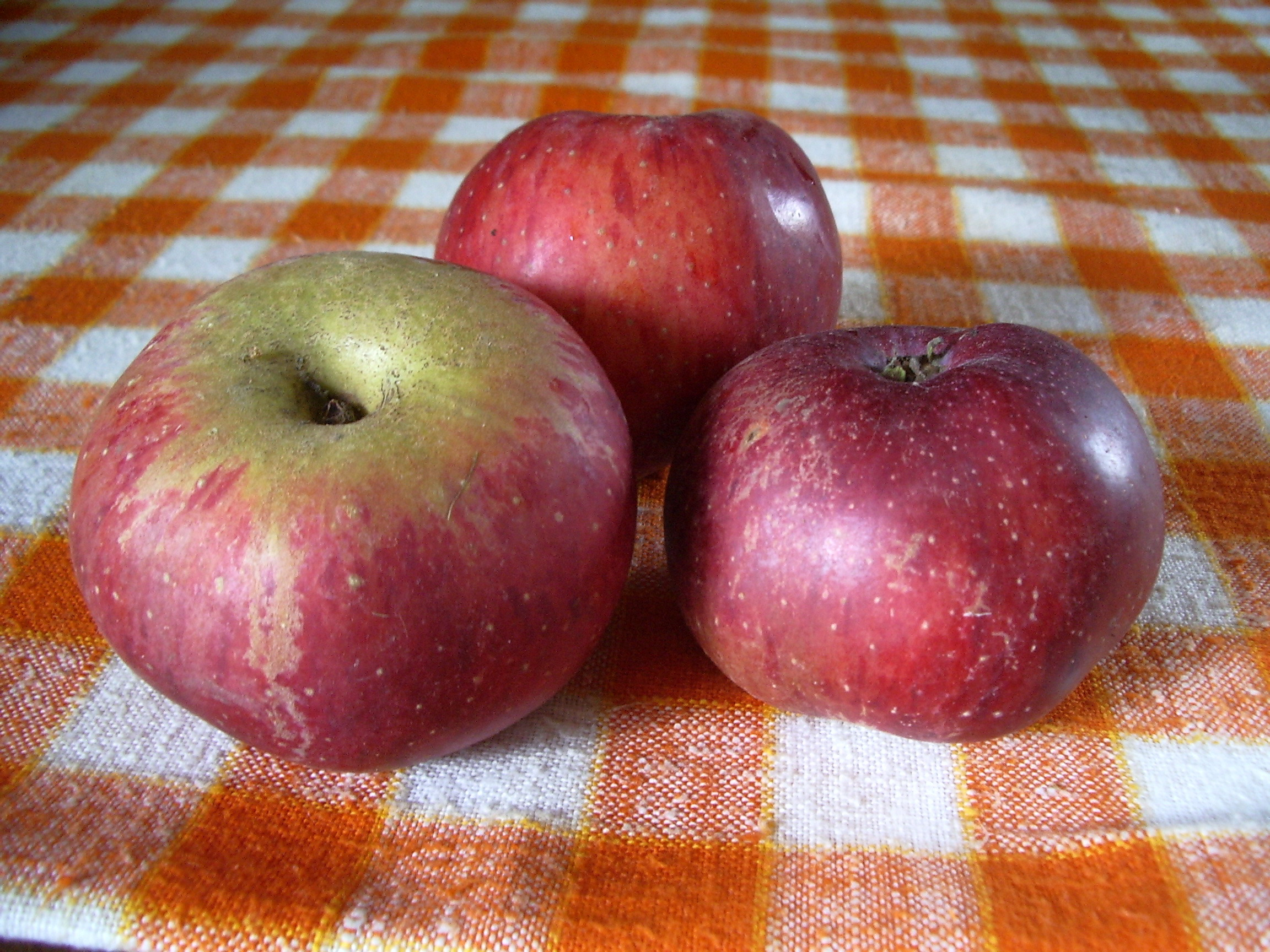 Grand Alexandre, Ochancourt, Somme, Fr, russeting naturel partiel.